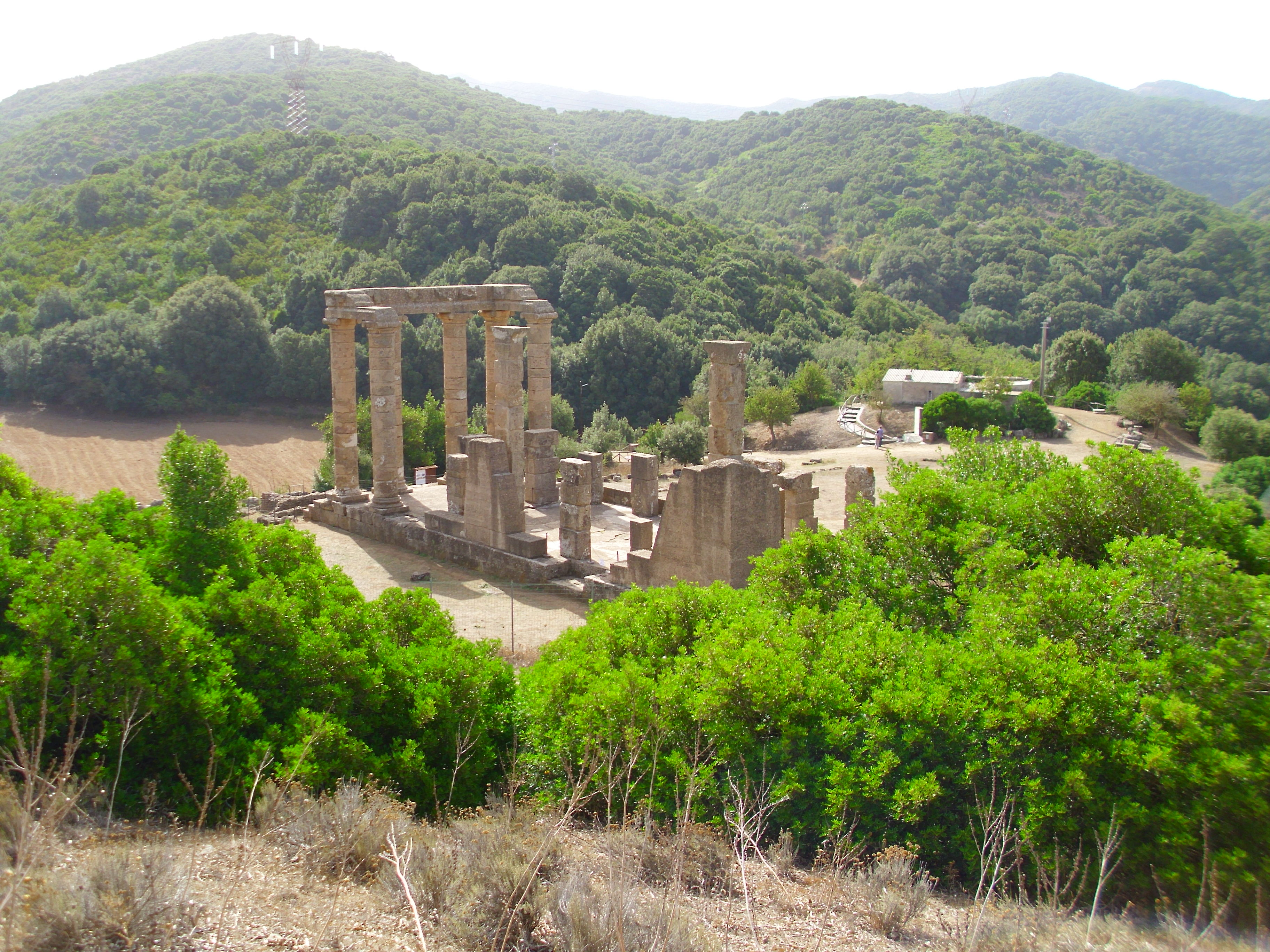 Tempio di Antas - MIBAC This is a photo of a monument which is part of cultural heritage of Italy.